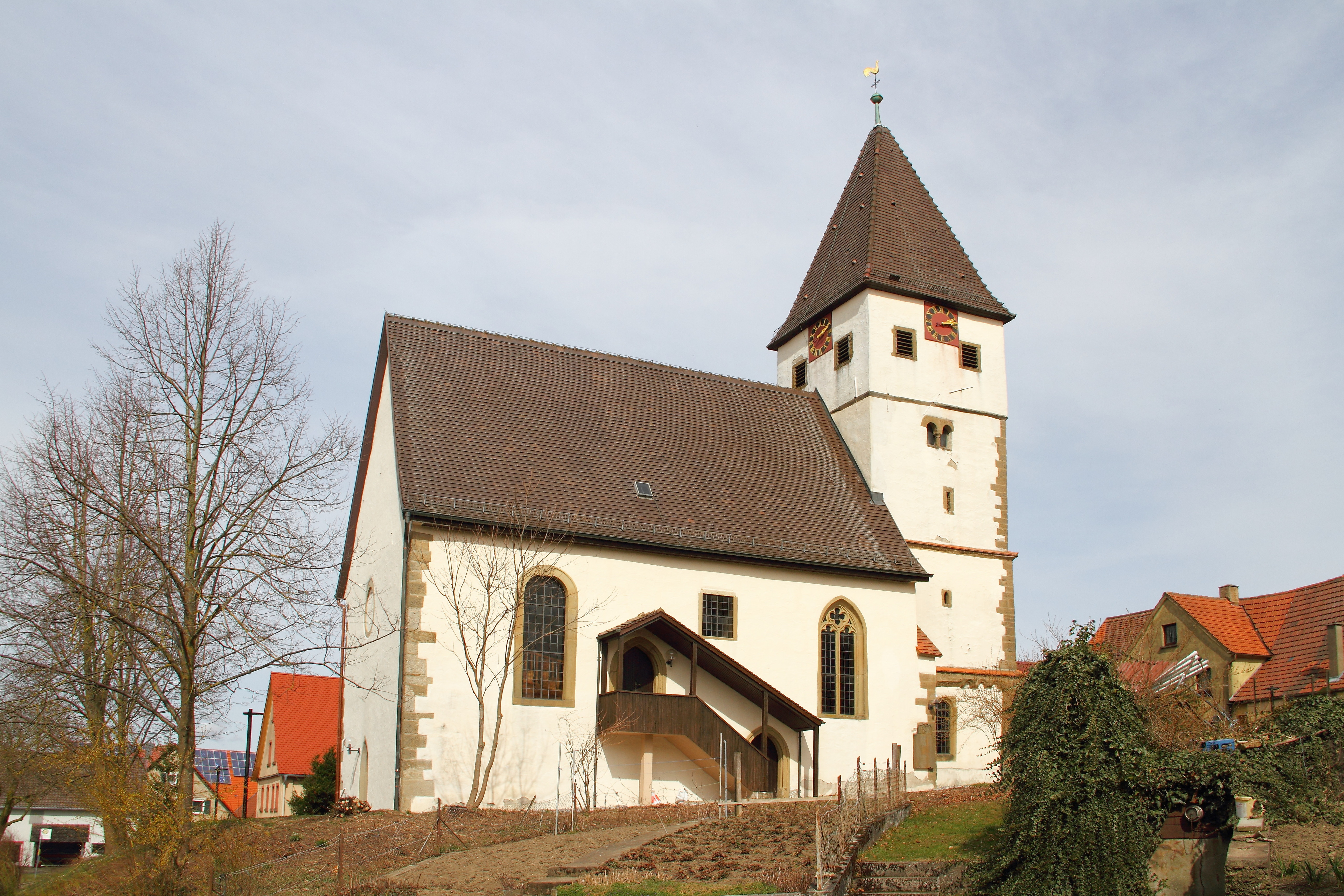 Die denkmalgeschützte Evangelische Pfarrkirche mit dem romanischem Chorturm der ehem. Wehrkirchanlage.